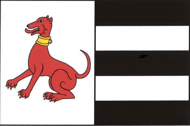 Polní Chrčice vlajka